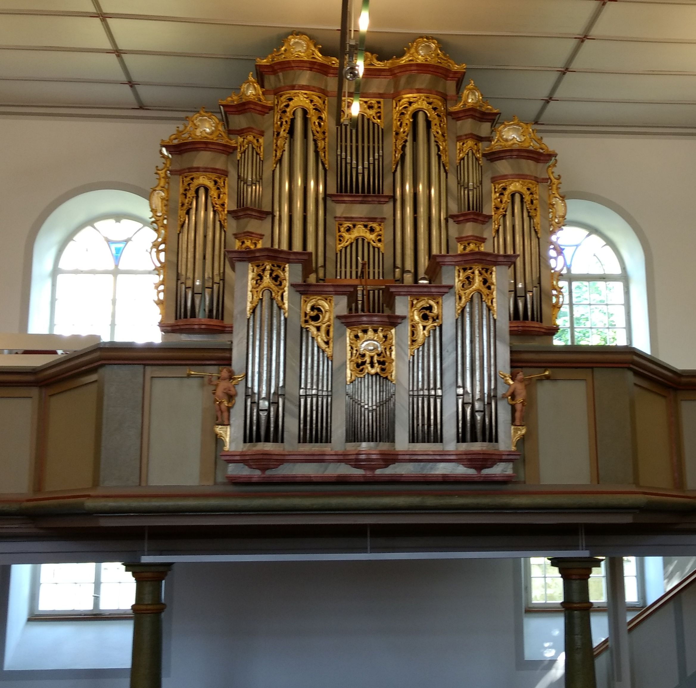 Weinmar-Orgel aus dem Jahr 1784 in der Nikolauskirche Mundelsheim